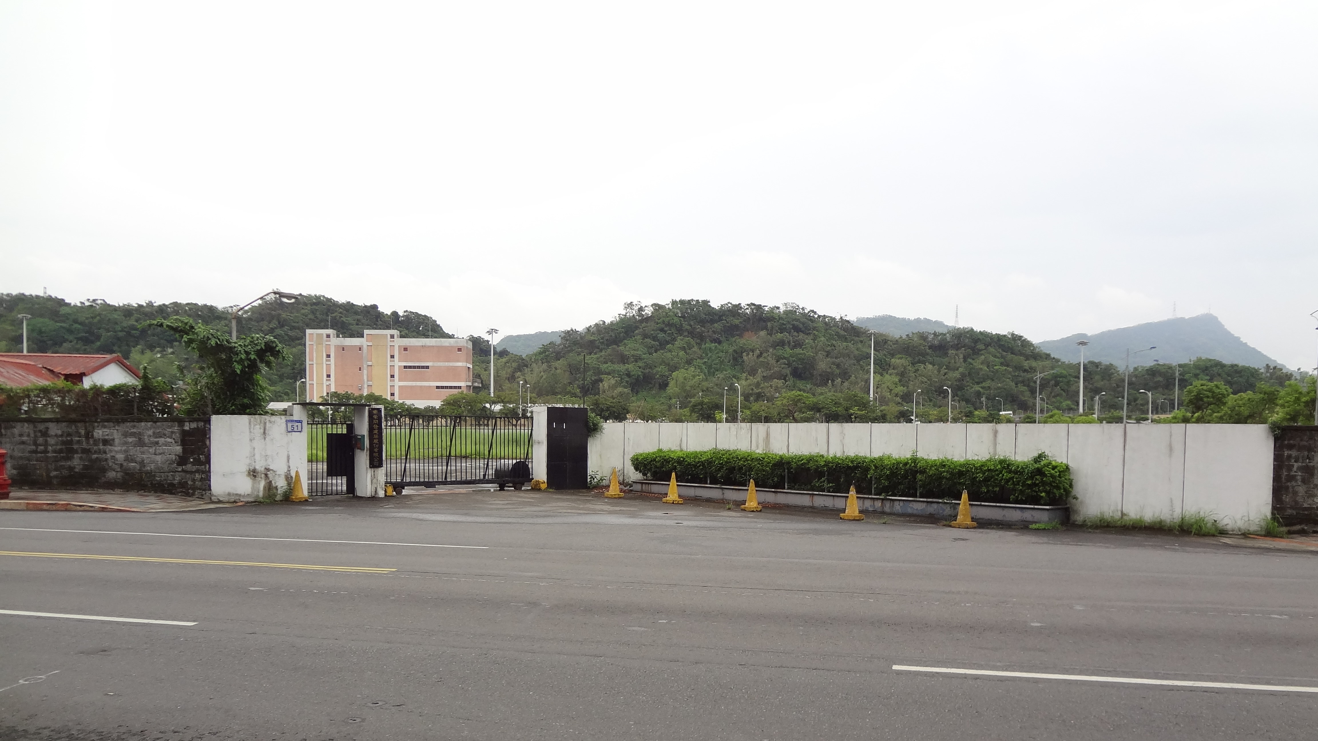 南港輪胎南港廠，位於臺北市南港區南港路二段51號，已被拆除完畢。